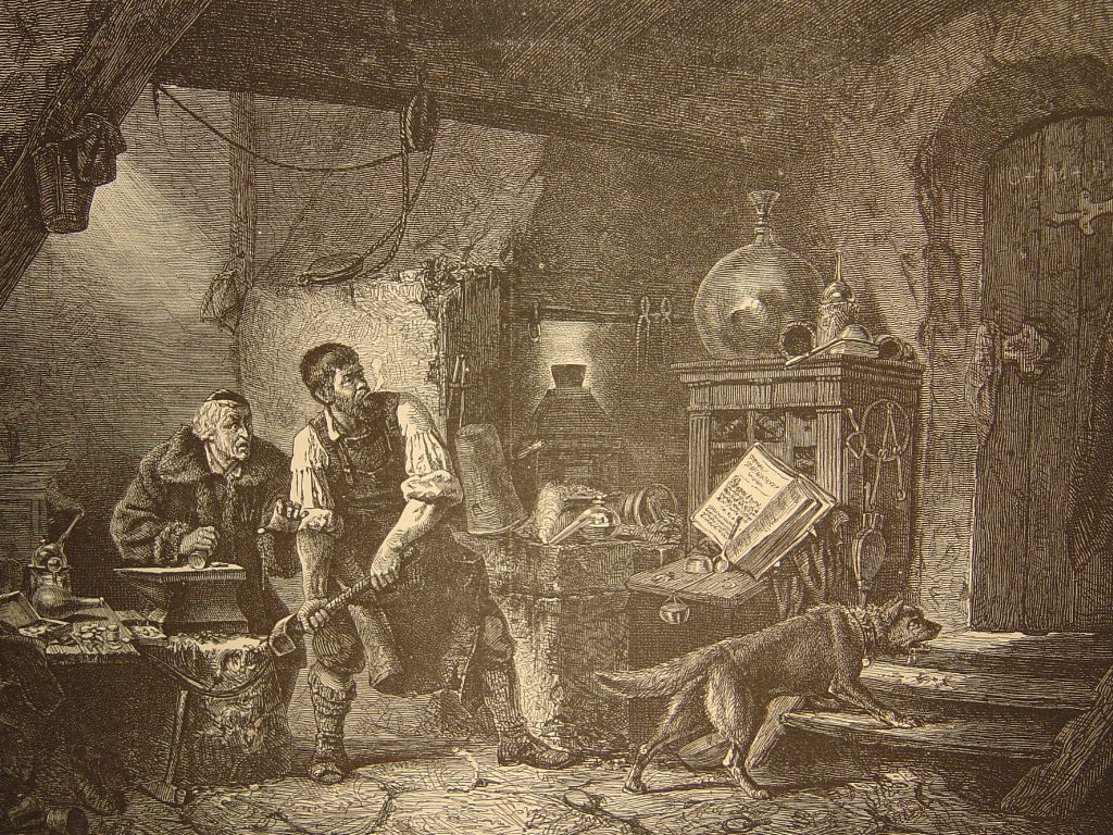 faux monnayeurs par Lischaner de Dusseldorf